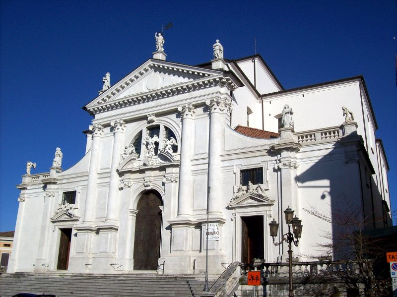 Duomo di San Daniele del Friuli